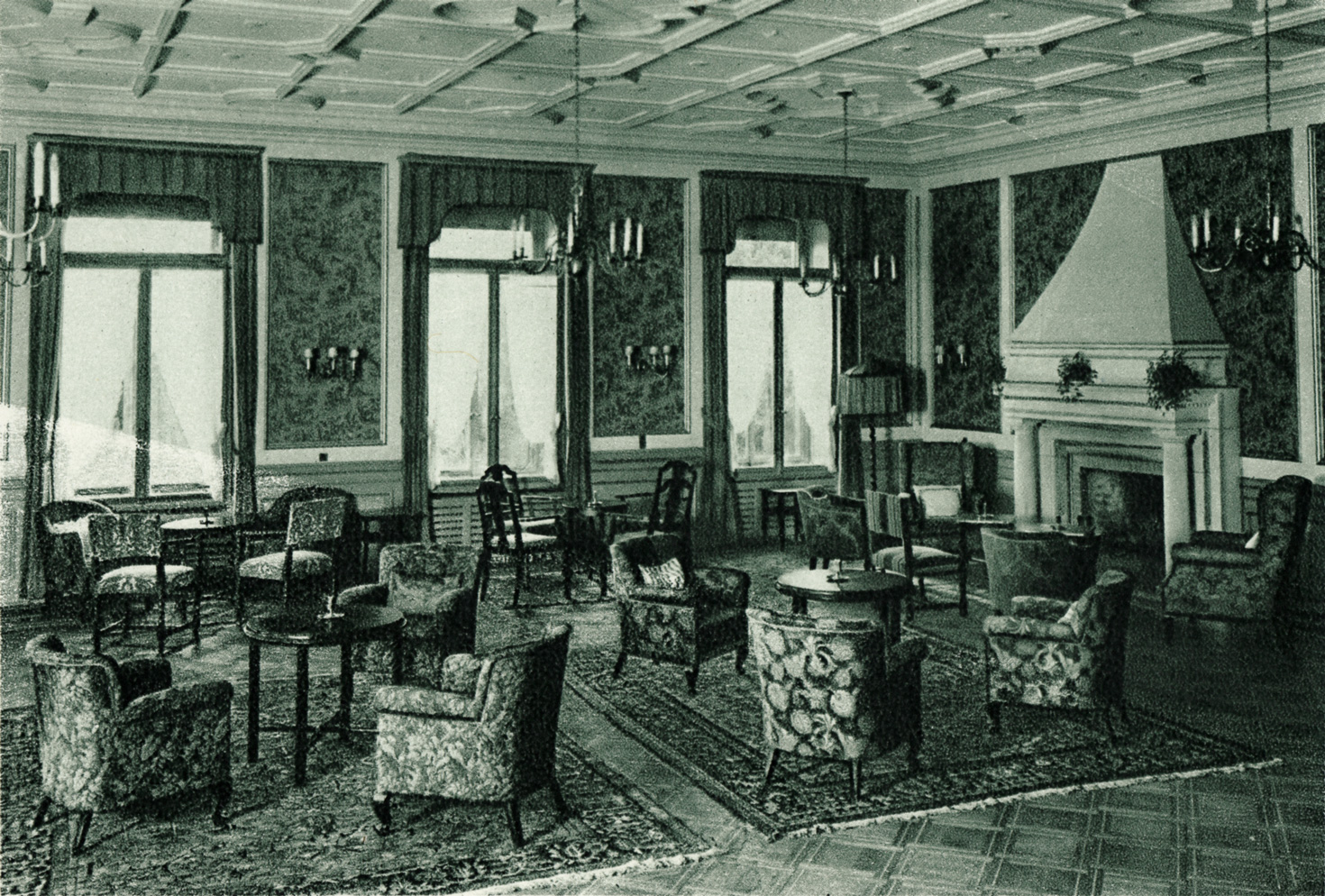 Hotel Pontresina: Halle, ca. 1910